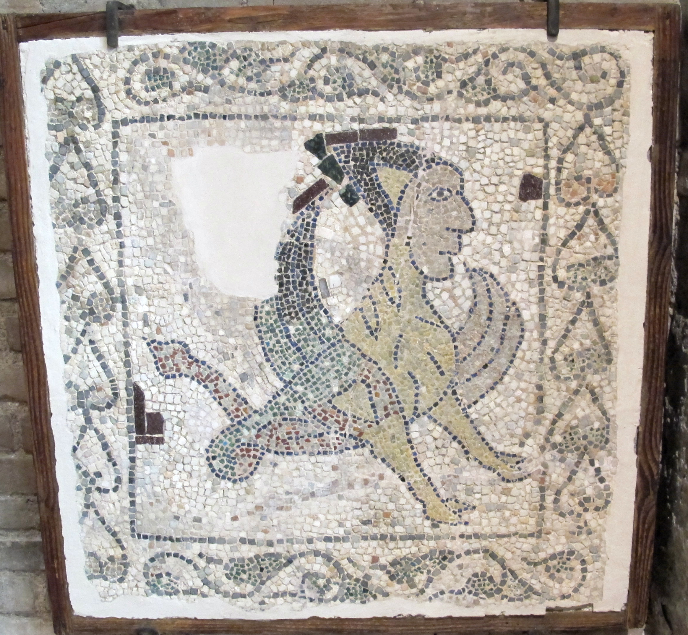 Frammenti di mosaico pavimentale del 1213